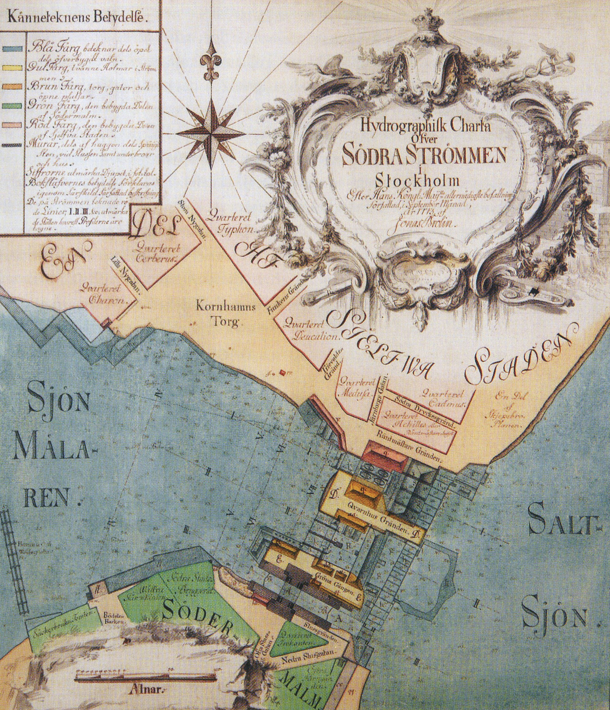 Hydrografisk karta över Polhems sluss